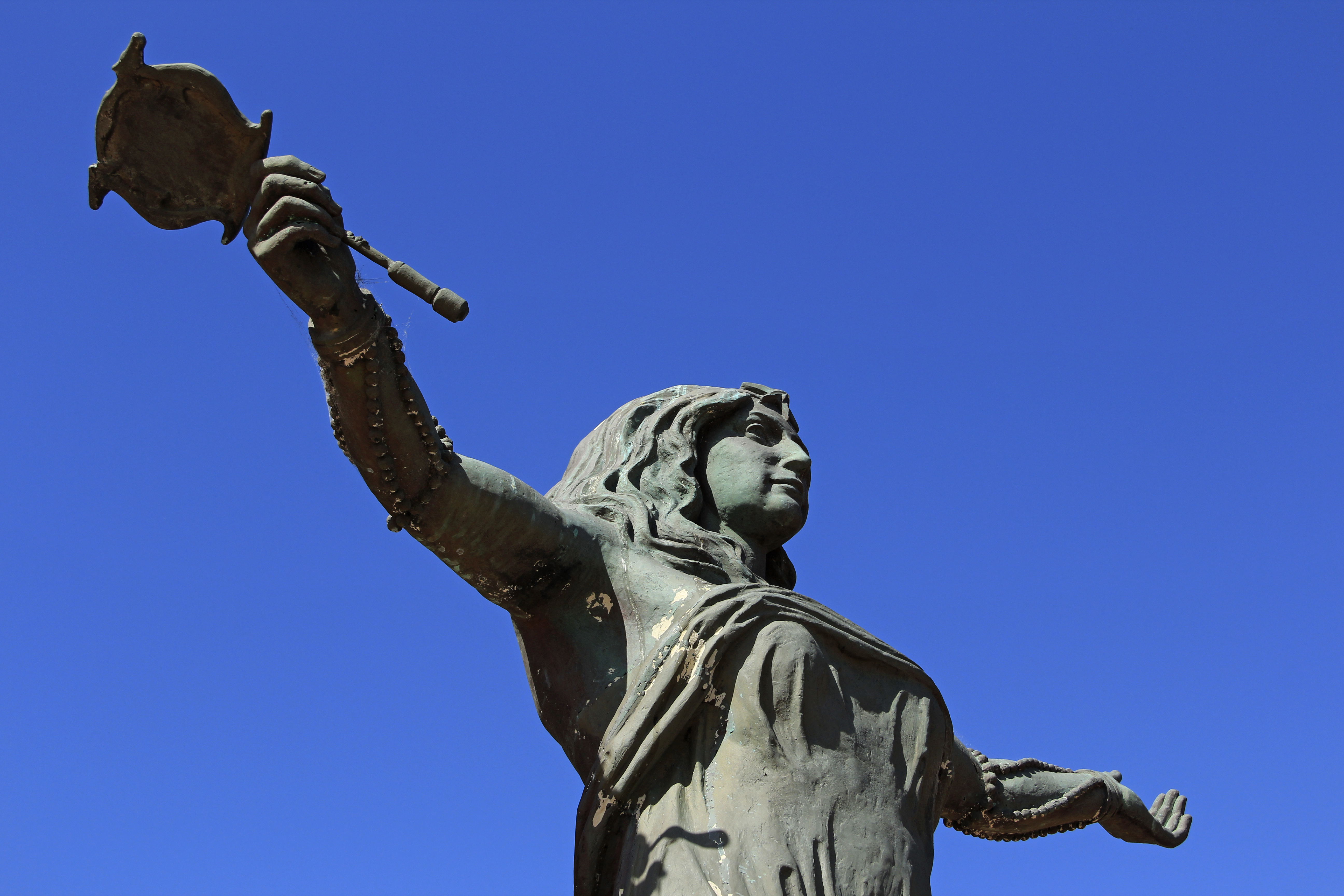 Iemanjá. Ubicada en el departamento de Montevideo